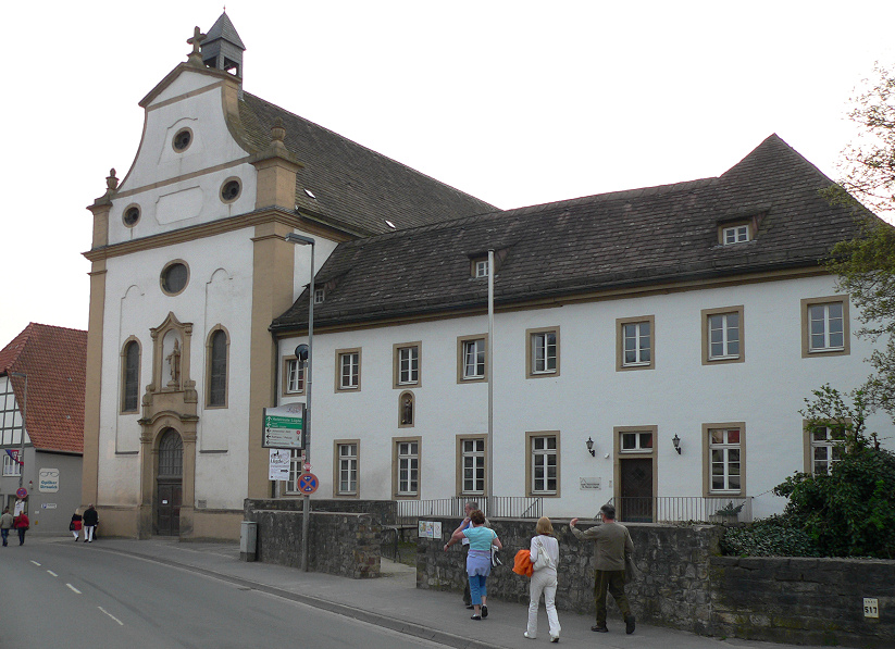 Kath. Kirche, ehemals Franziskaner Kloster